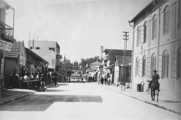 בית הכנסת הגדול בפתח תקוה בחוף יהודה